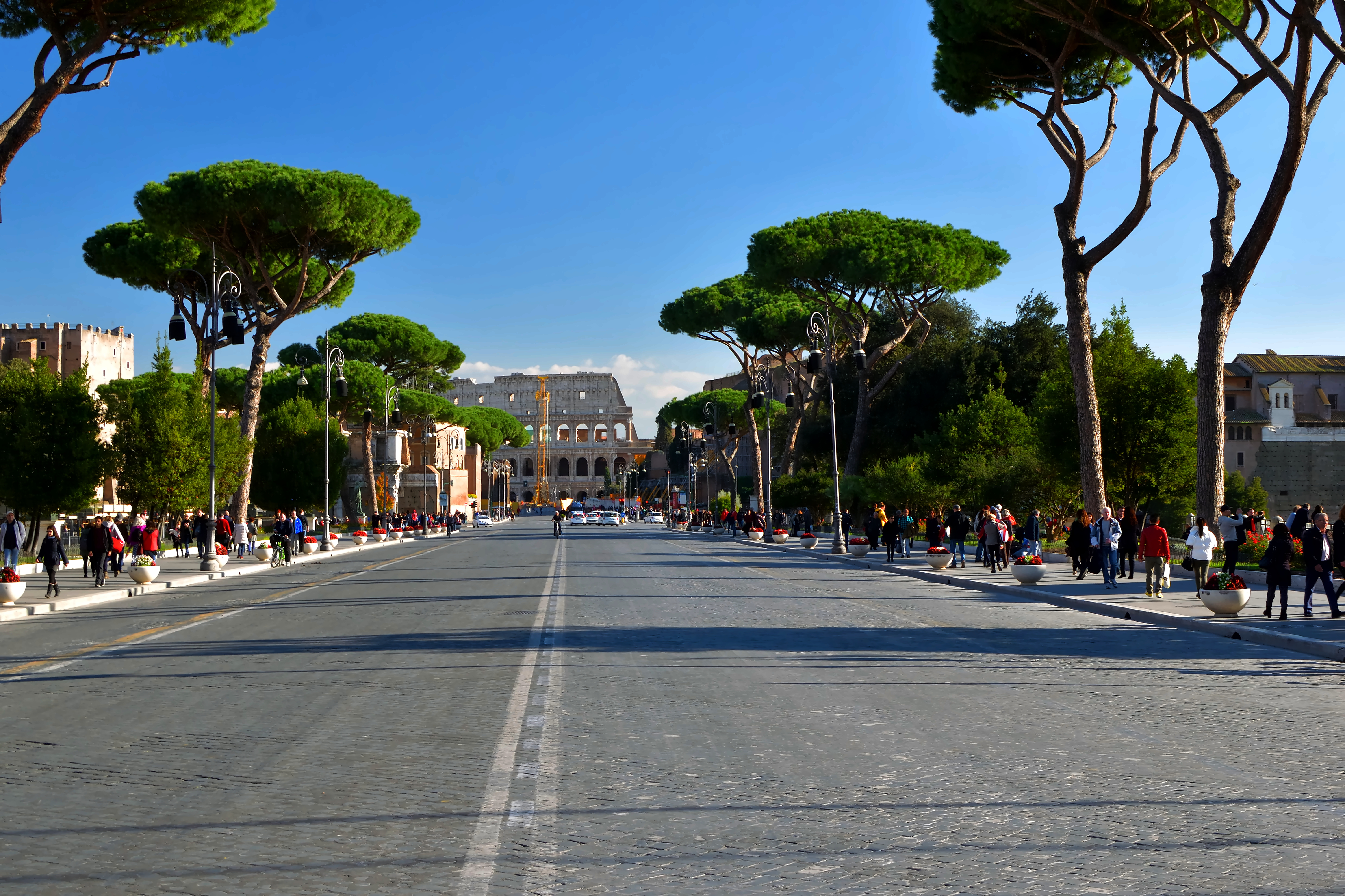 Die Via dei Fori Imperiali in Richtung zum Kolosseum